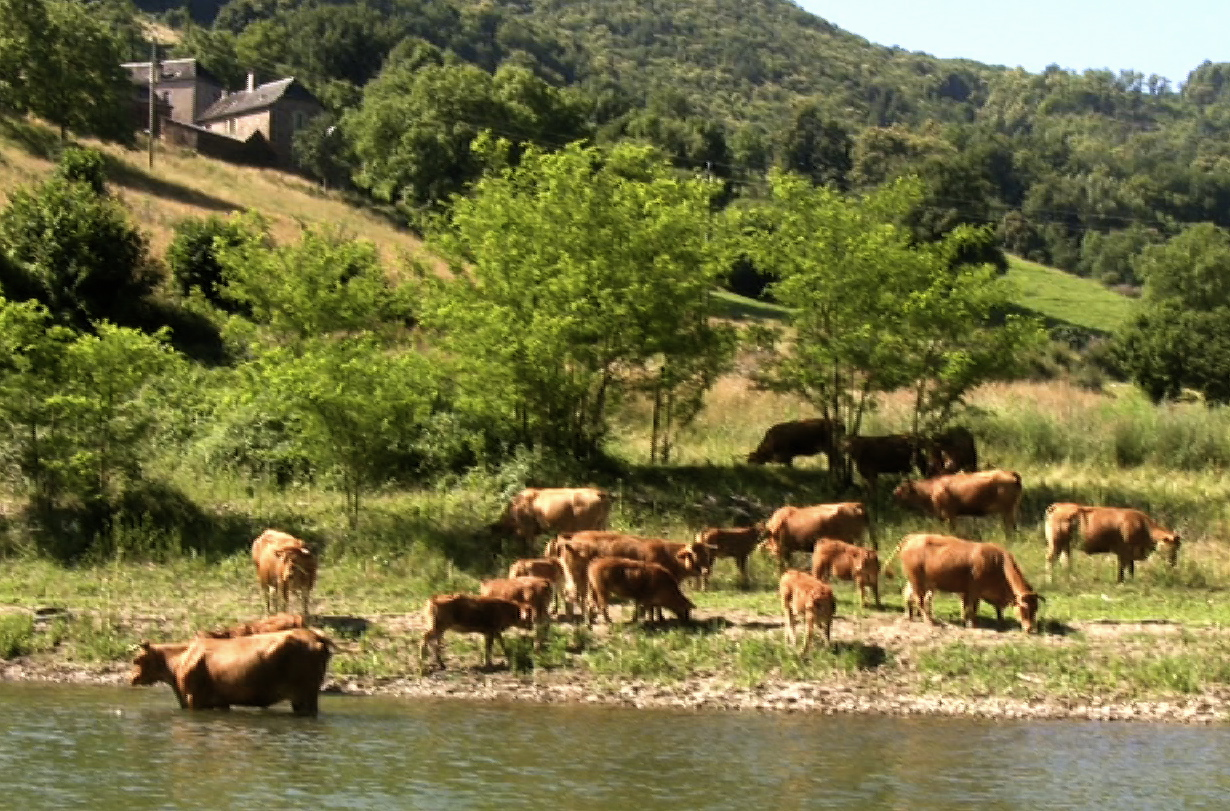 Troupeau au bord du Lot. En haut à gauche: le hameau des Navechs. (Pomayrols-Aveyron-France)